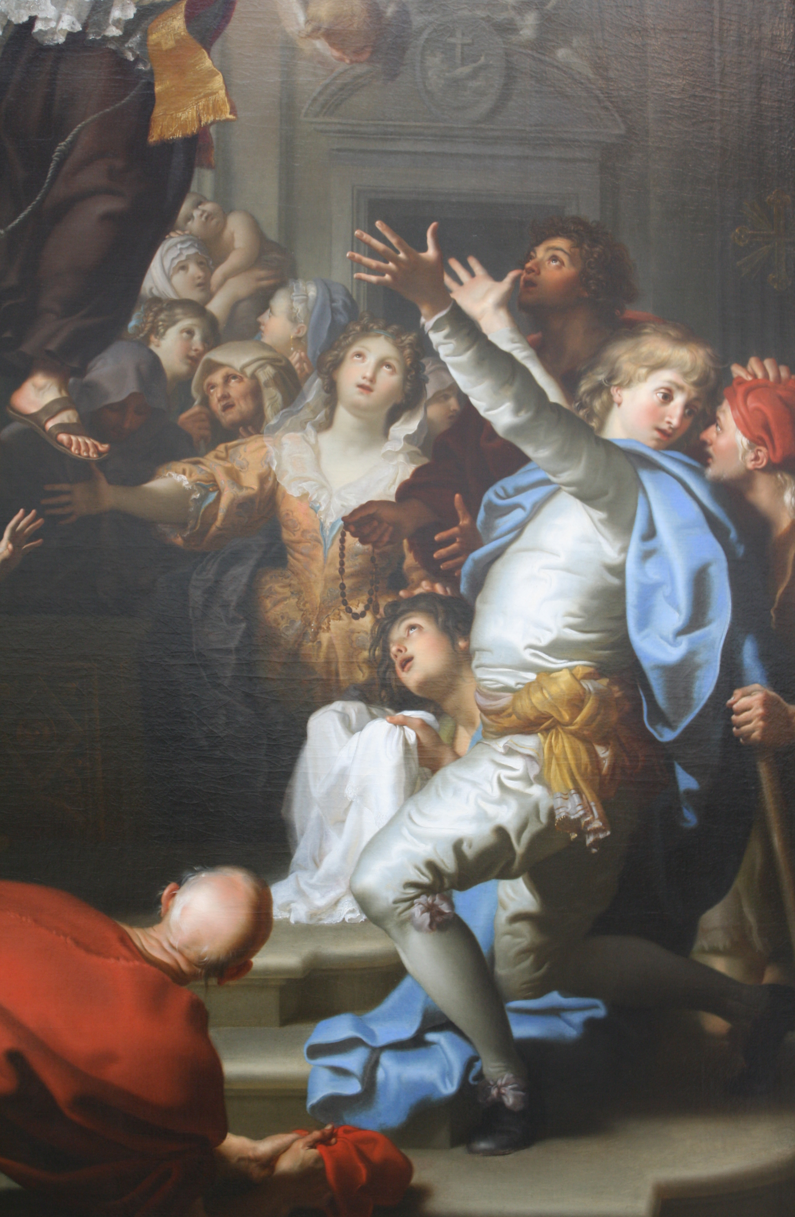 detail